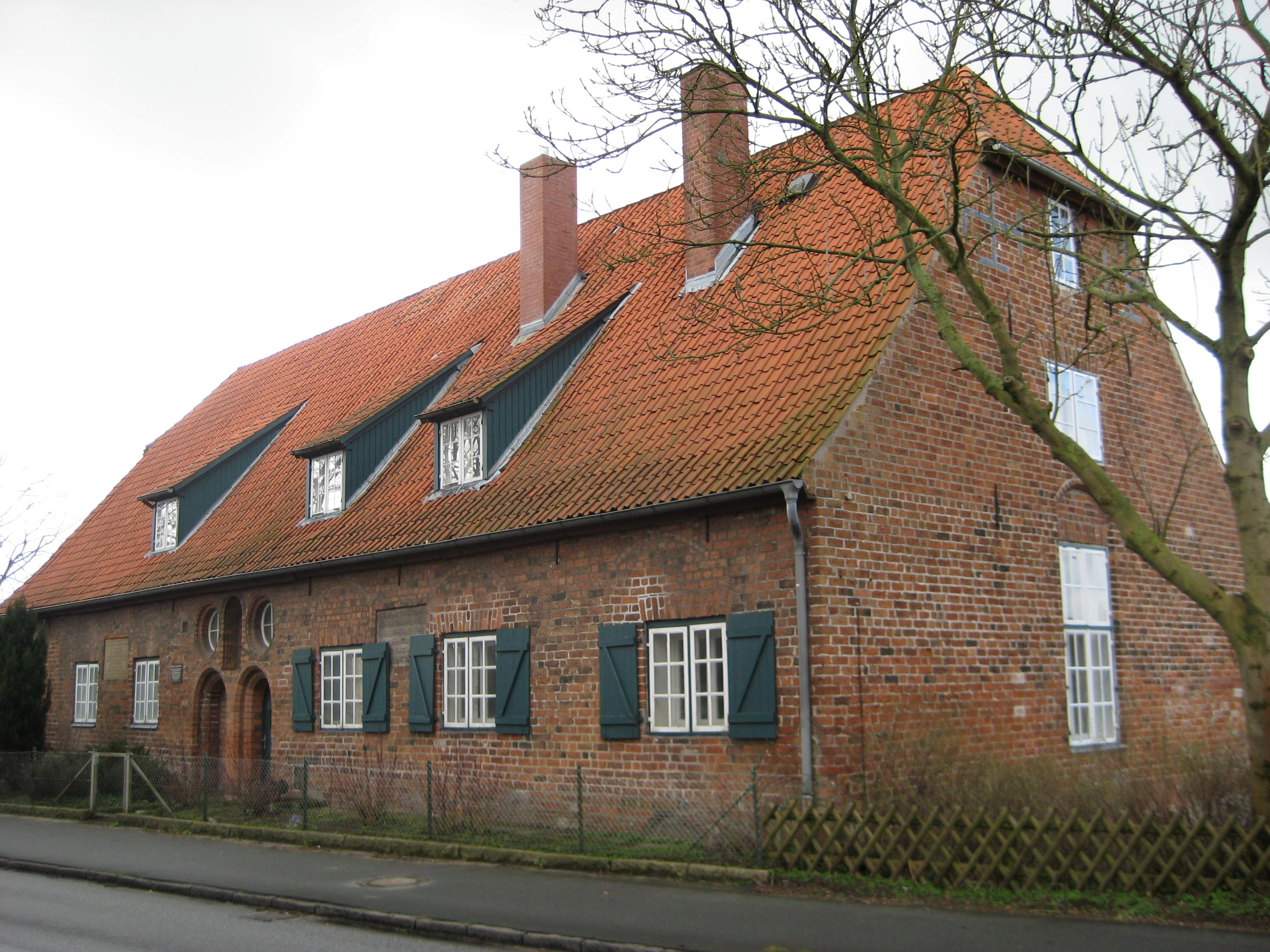 Siechenhaus in Klein-Grönau, gehört zu Lübeck, liegt aber in mitten Groß Grönau